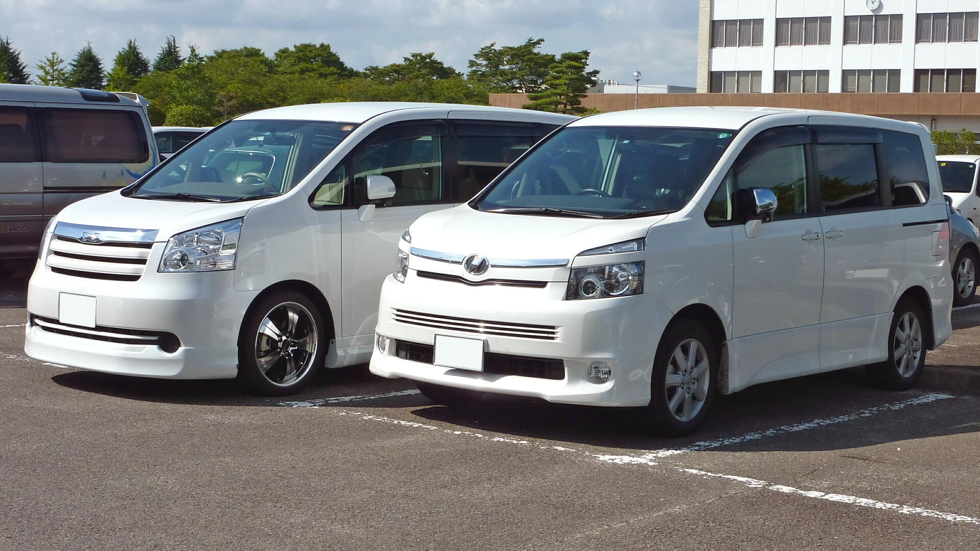 トヨタ・ノア（3代目）とトヨタ・ヴォクシー（2代目）の並び